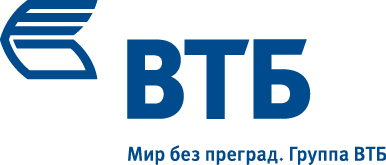 логотип ВТБ